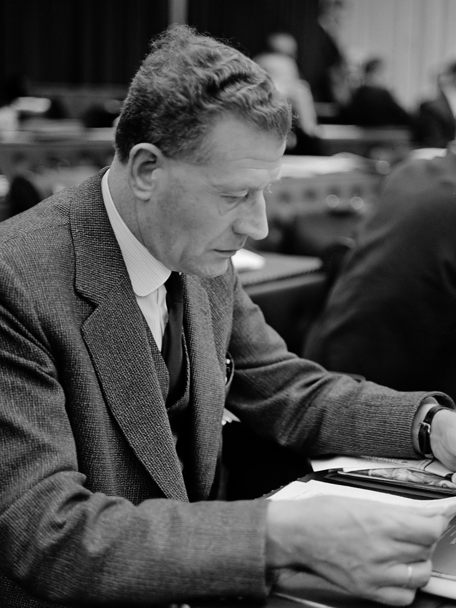 Kwestie Bijlmermeer in Tweede Kamer , de heer Elfrich bereidt zijn rede voor 27 oktober 1964